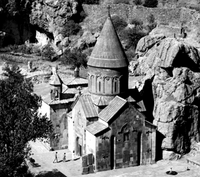 എട്ടാം ശതകത്തില്‍ നിര്‍മിതമായ ജഗാര്‍ഡ് ക്ഷേത്രത്തിന്റെ പൊതുവീക്ഷണം